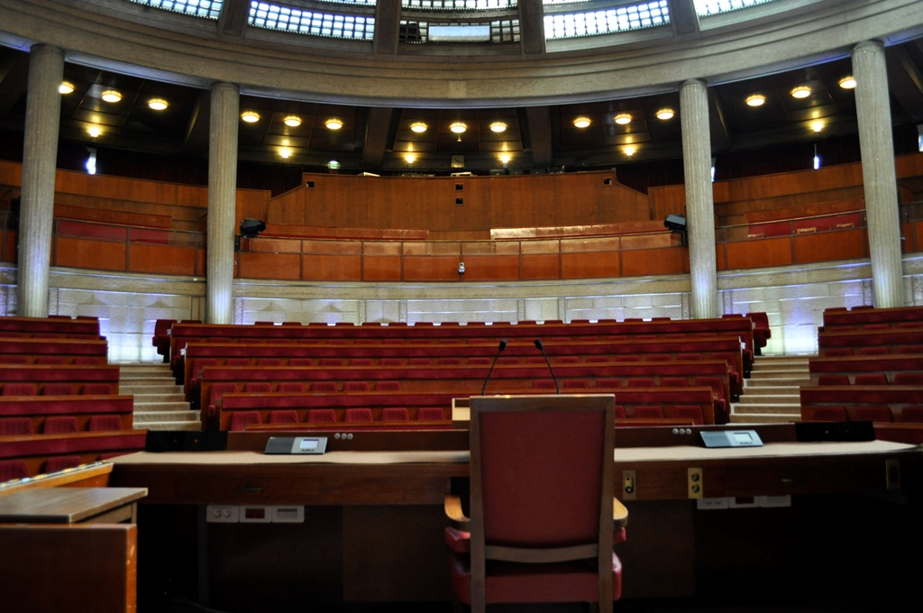 Hémicycle du Palais d'Iéna, 9 Place d'Iéna, 16e arrondissement de Paris, Photo prise lors des journées européennes du patrimoine 2012.